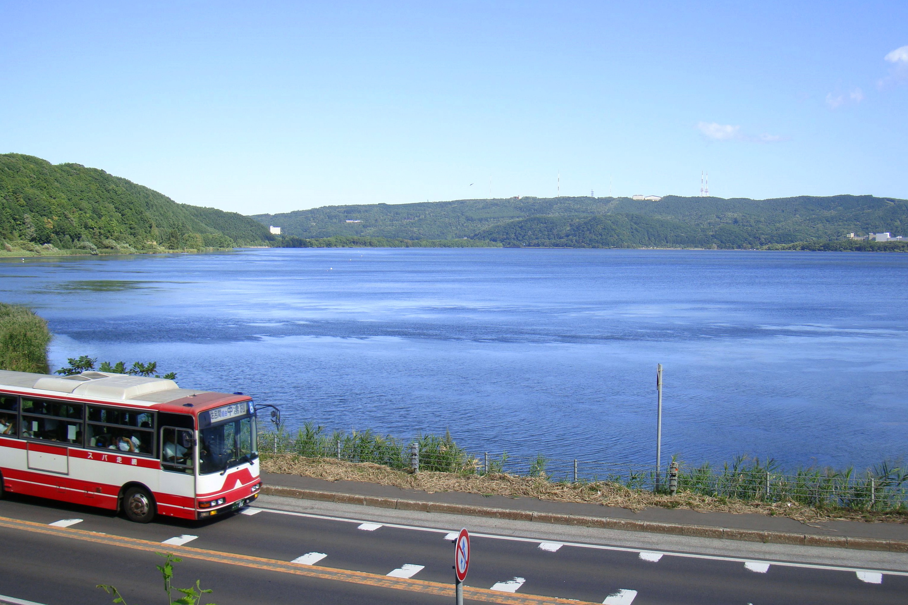 Lake Abashiri